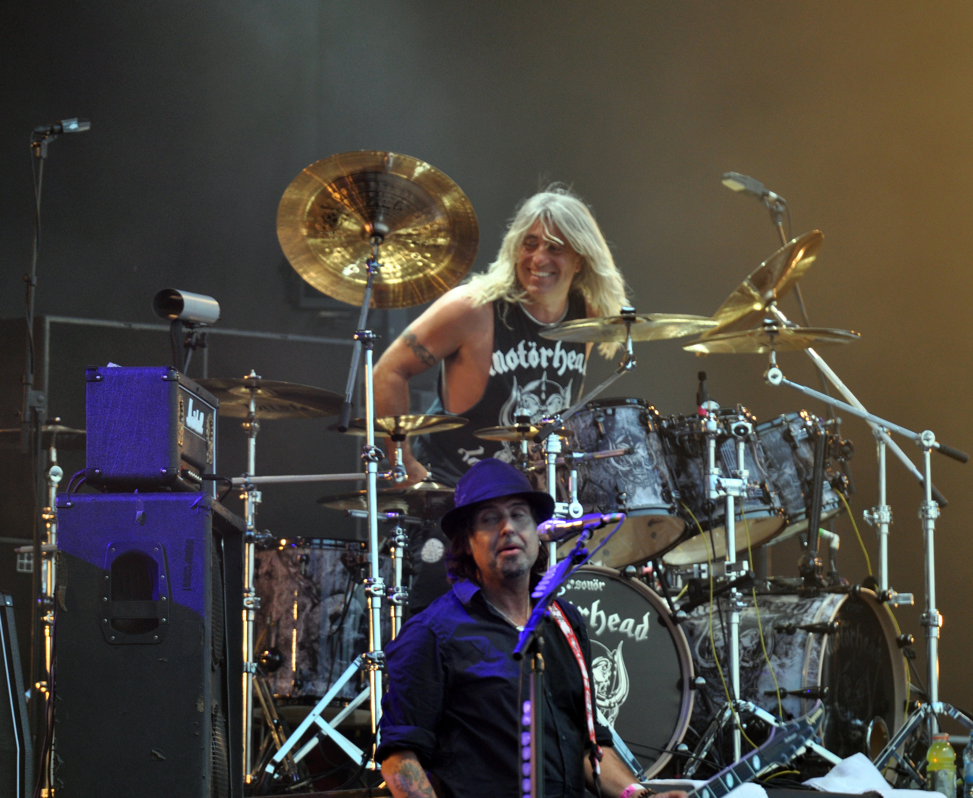 Motörhead at Wacken Open Air 2013